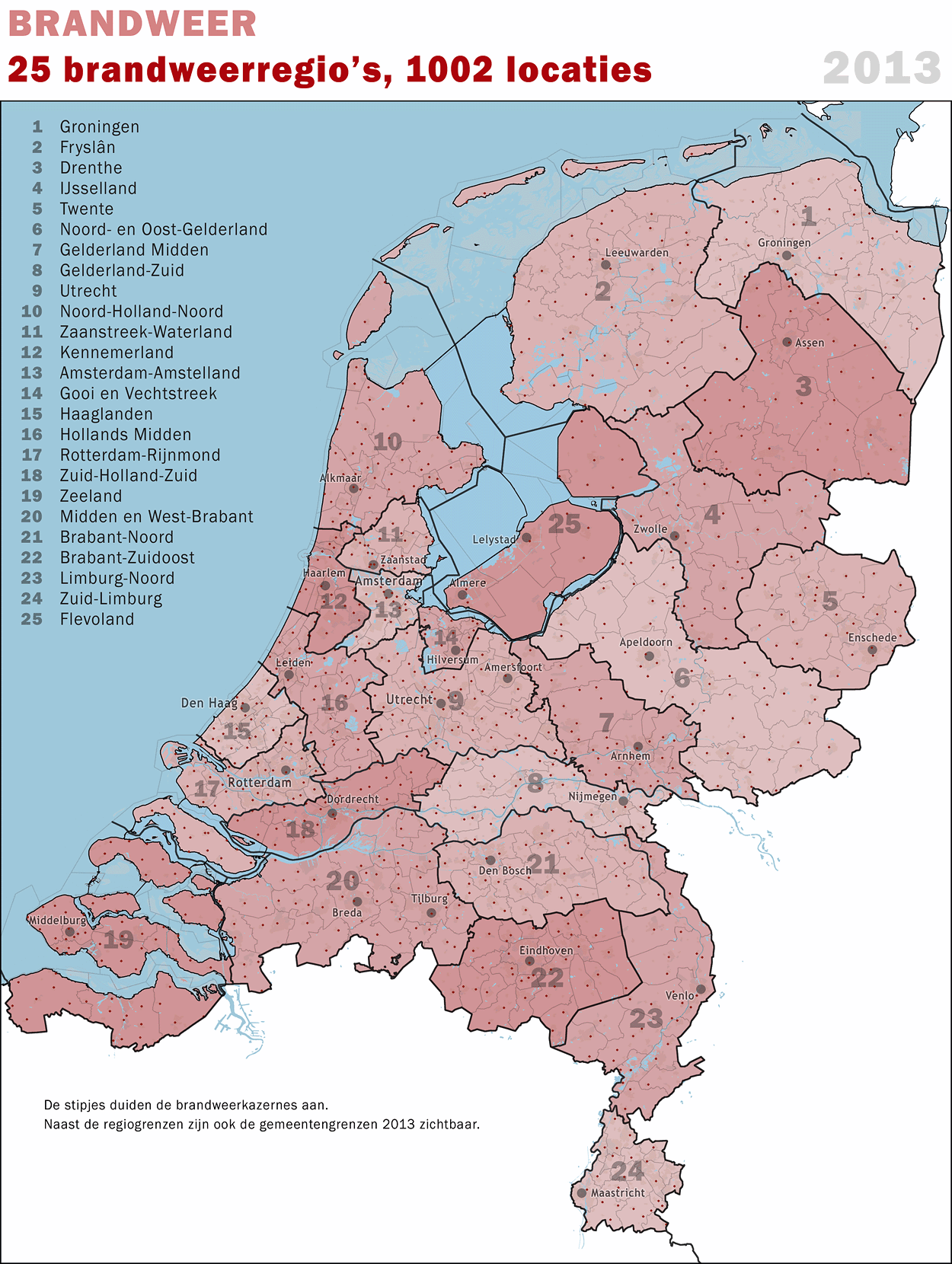 Brandweerregio's per 1-1-2013, inclusief locaties van Brandweerkazernes.